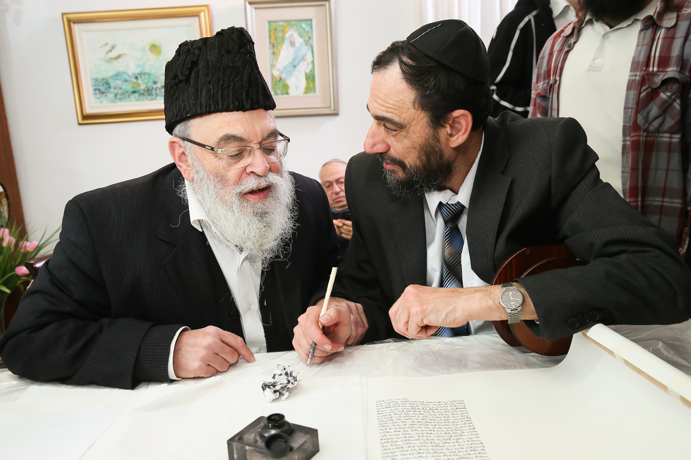 ישיבת מרכז הרב. הרב וייס בטקס הכנסת ספר תורה בישיבת מרכז הרב, תשע"ה.